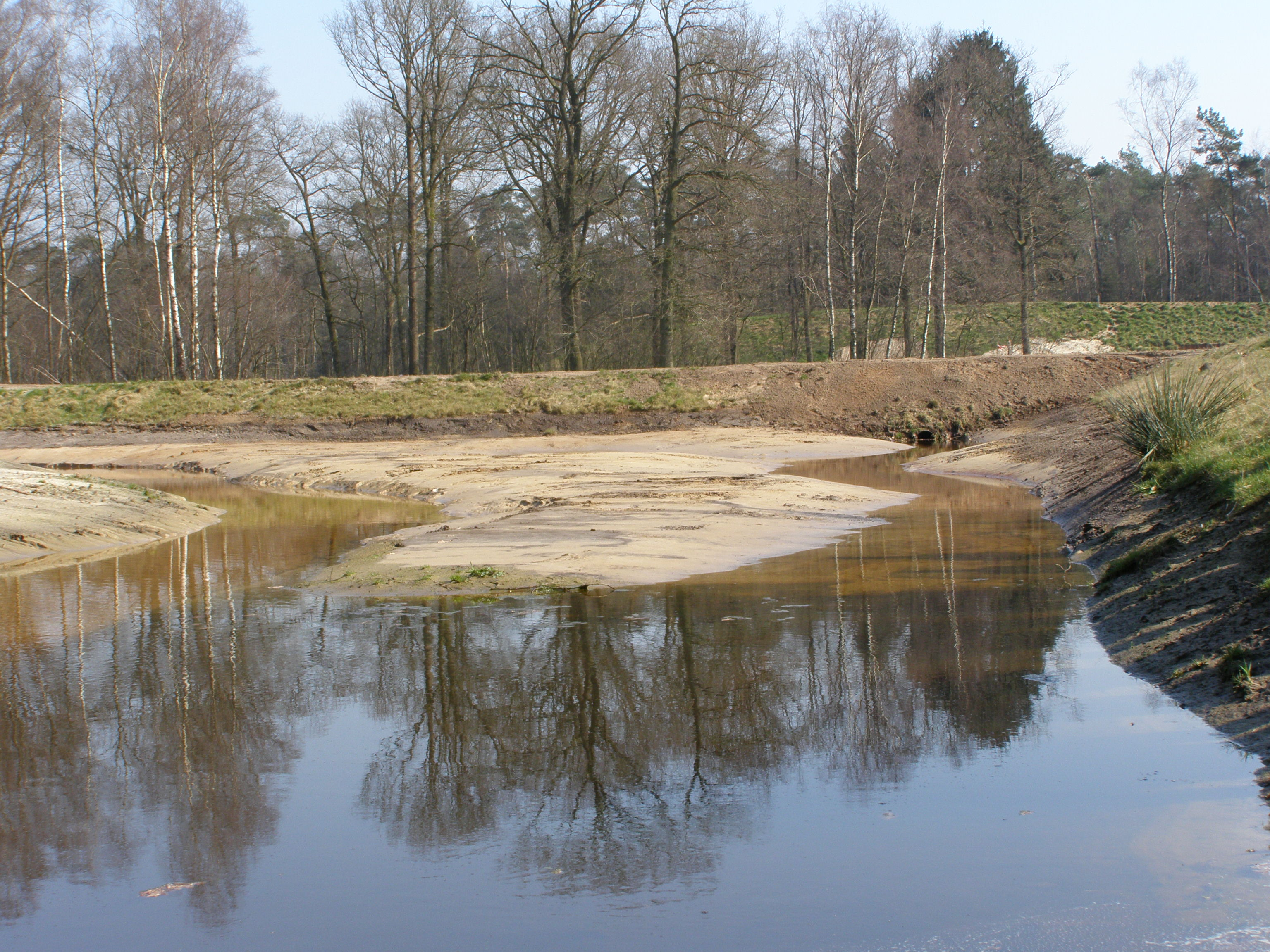 eigen werk